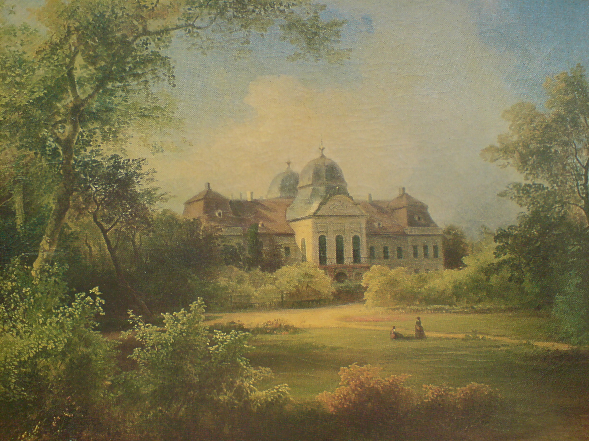 Schloss Gödöllö. Gemälde von Sandor Brodsky, 1869 .